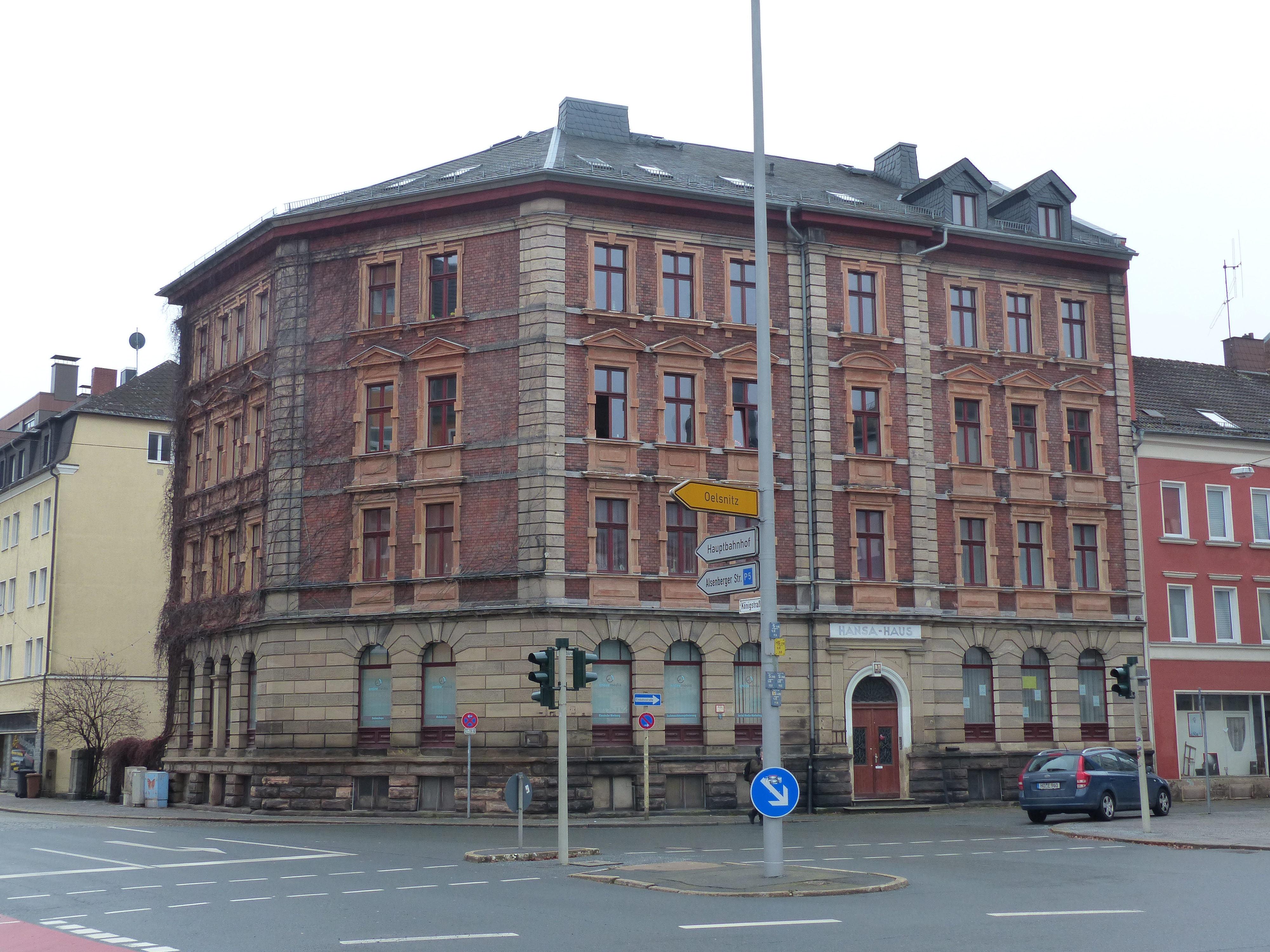 Hansa Haus in Hof, Sophienberg 1